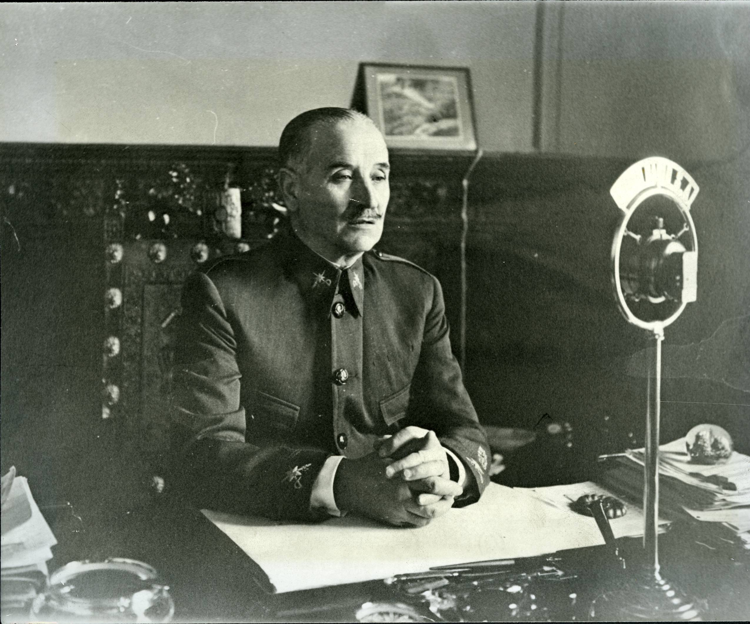 Fotografía del general Gonzalo Queipo de LLano del ejército español.